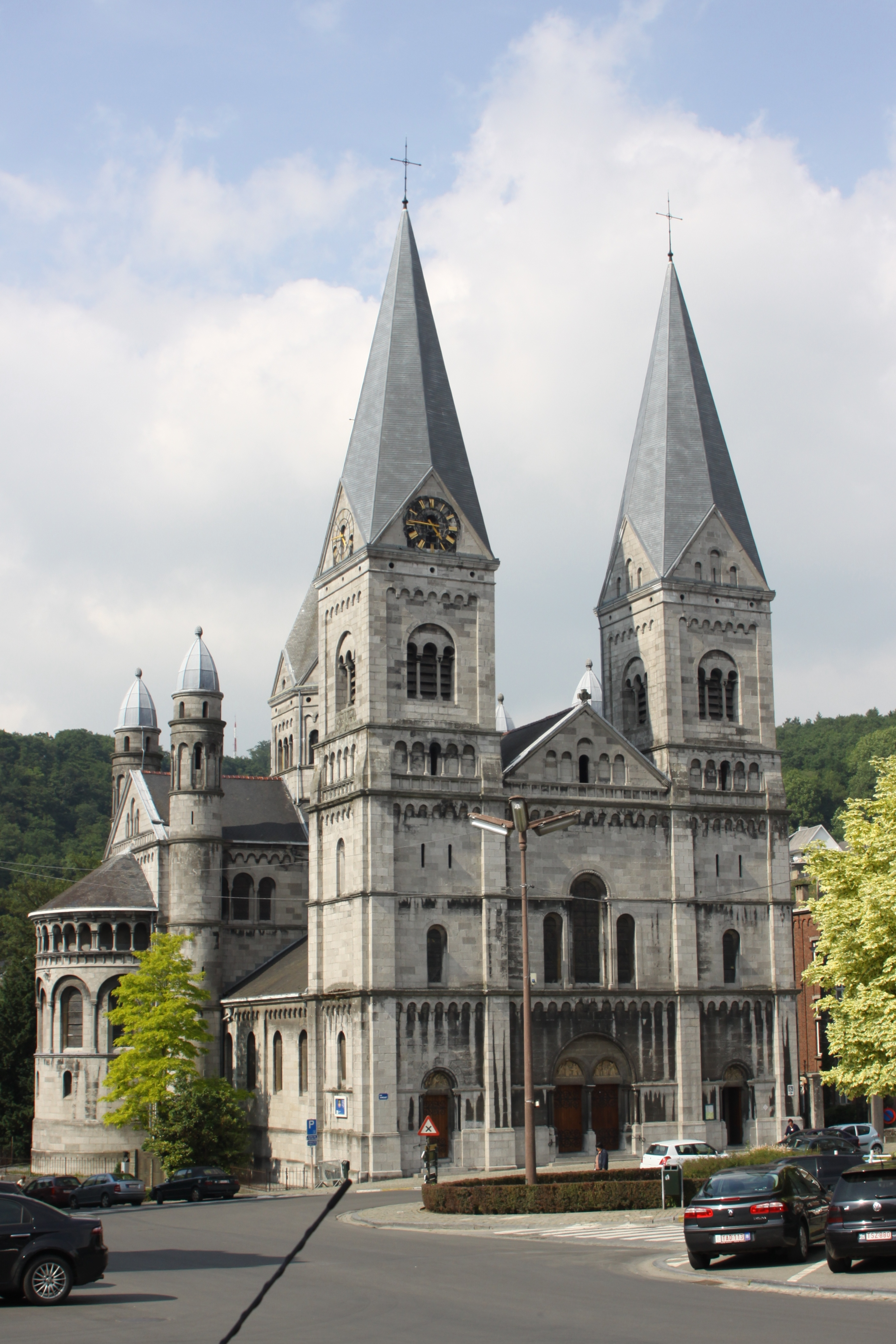 Église Notre-Dame et Saint-Remacle, rue Xhrouet, Spa